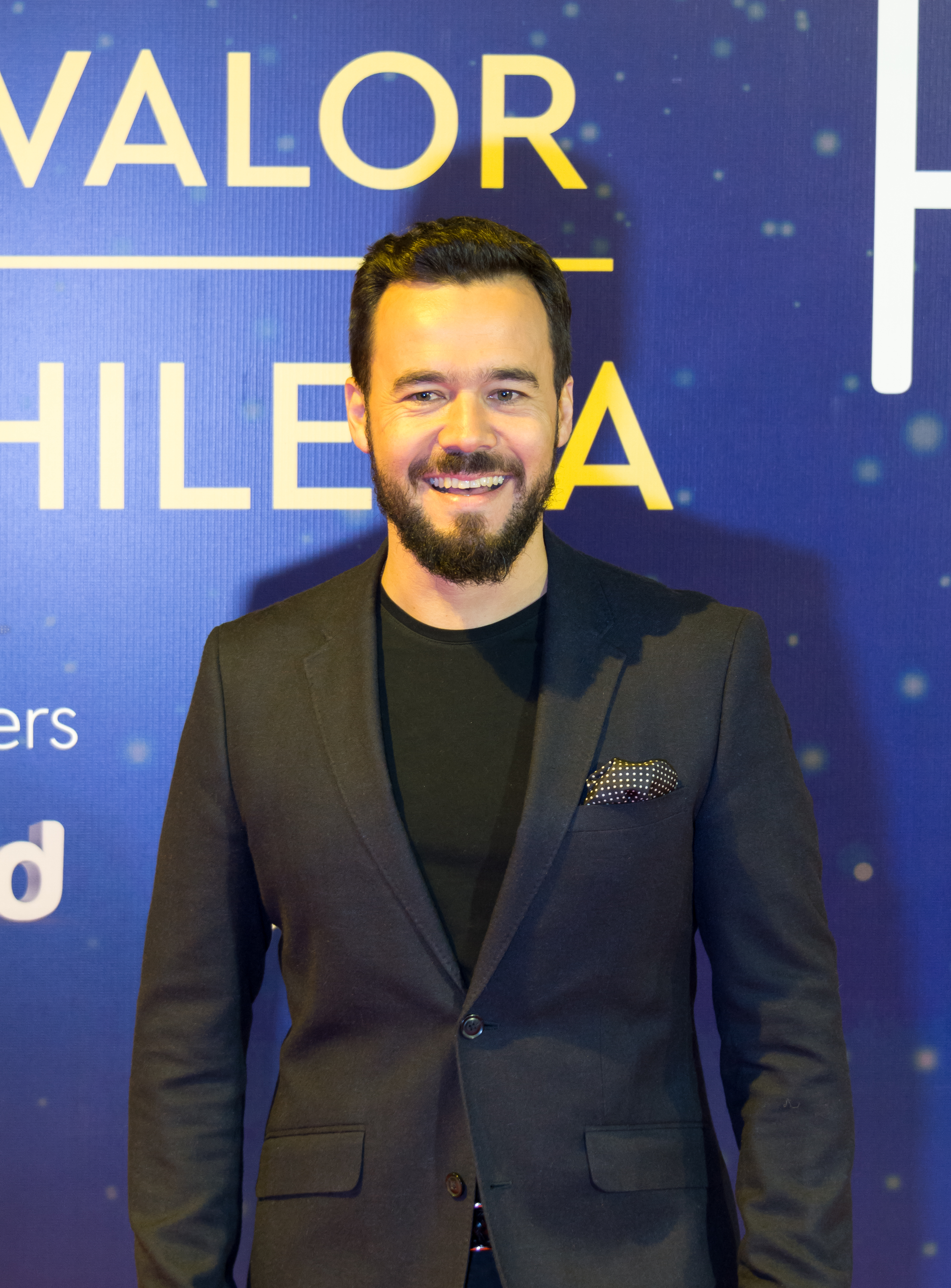 Eduardo de la Iglesia, Premios Pulsar 2019, Teatro Teletón, Santiago, Región Metropolitana, Chile.